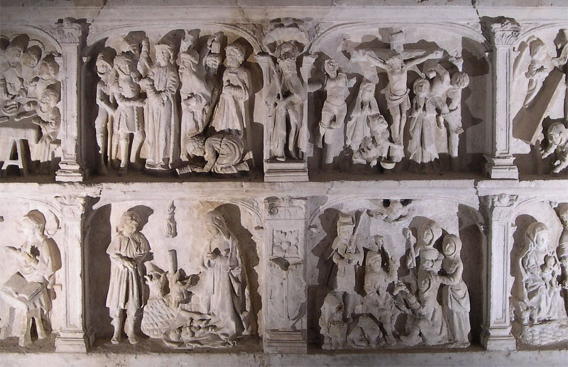 Priorat de Carennac. Escenes de la vida de Crist. Òlt, França